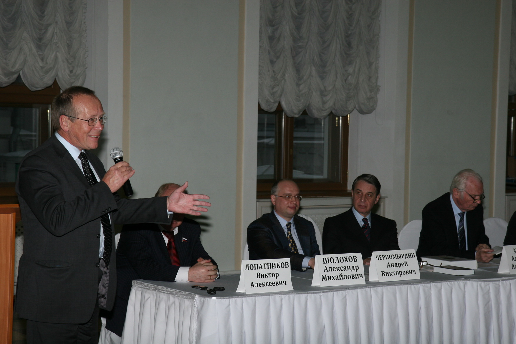 1-го декабря 2011 года в Российской Государственной библиотеке («Дом Пашкова») состоялась торжественная церемония вручения Большой литературной премии России за 2011 год